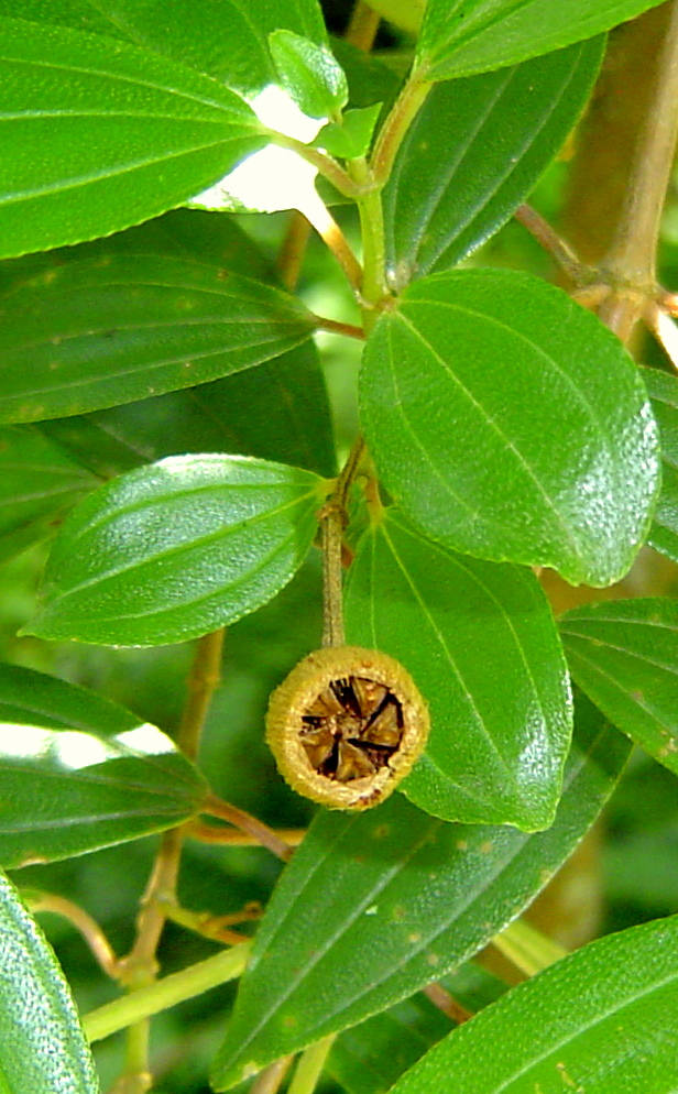 Samenkapsel + Blätter,Brunfelsia brasiliensis